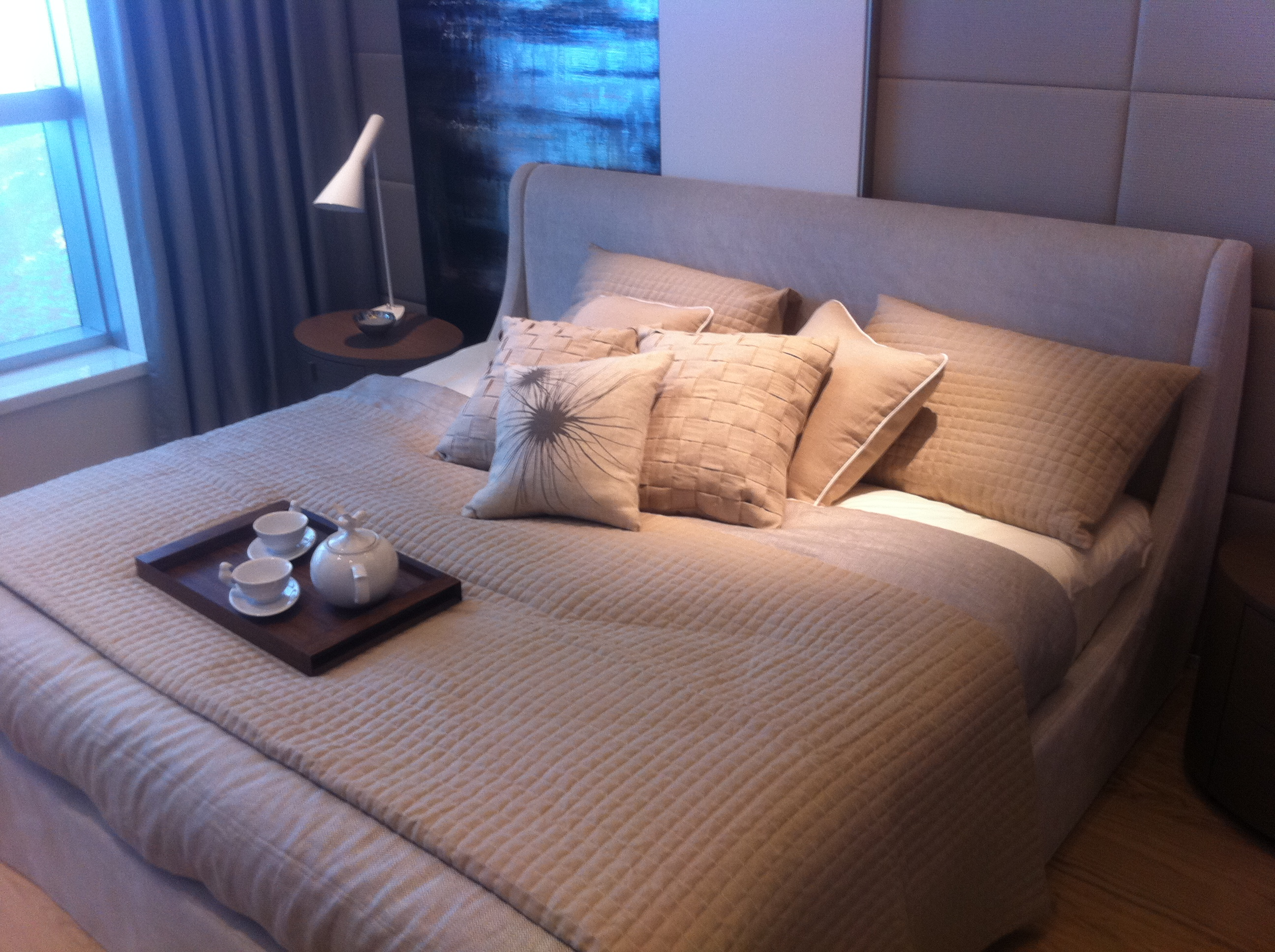 中文（香港）: 深灣9號zh:示範單位zh:睡房展品